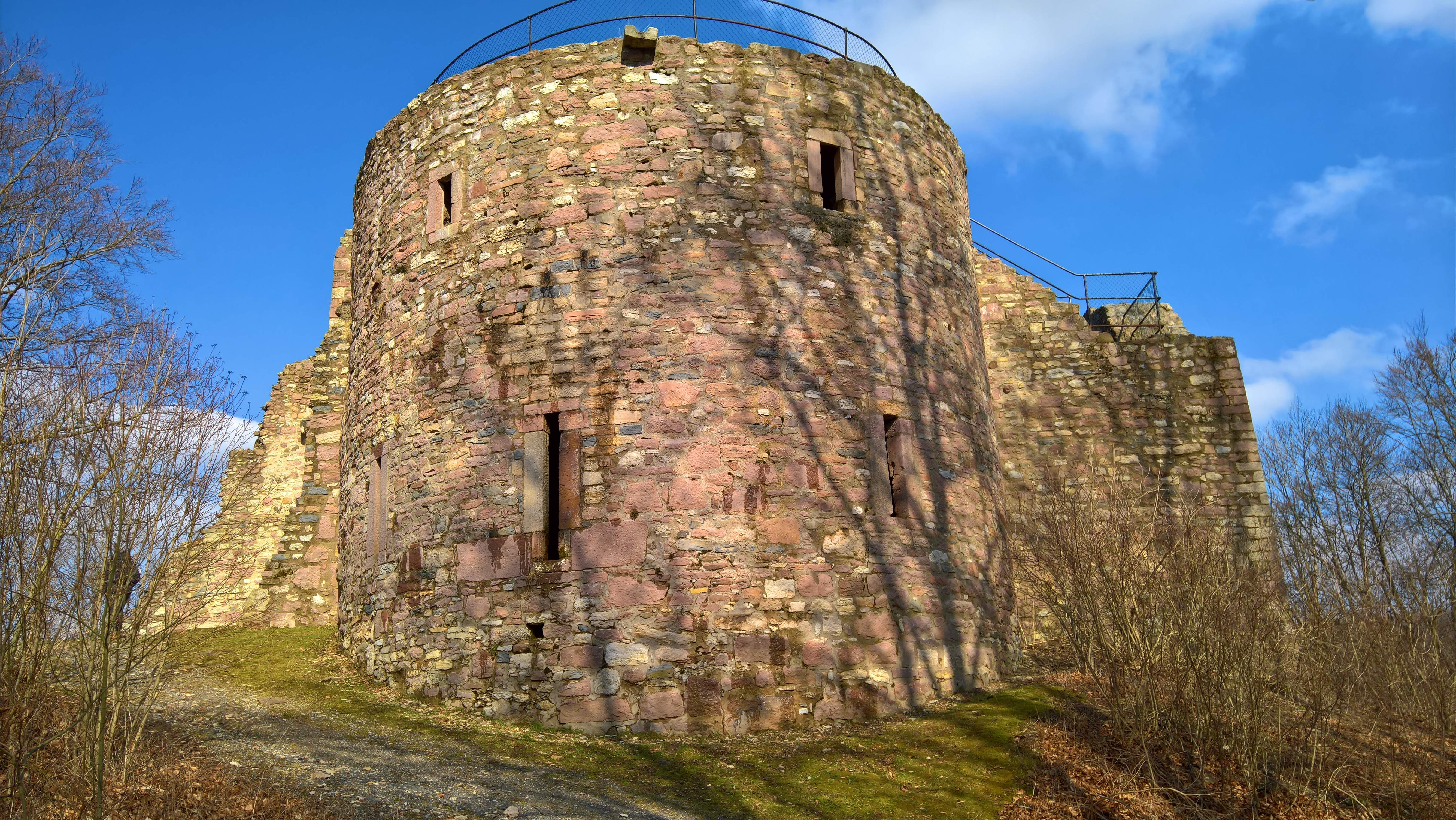 Burgruine Steckelberg bei Ramholz, Blick von Westen auf den Rundturm